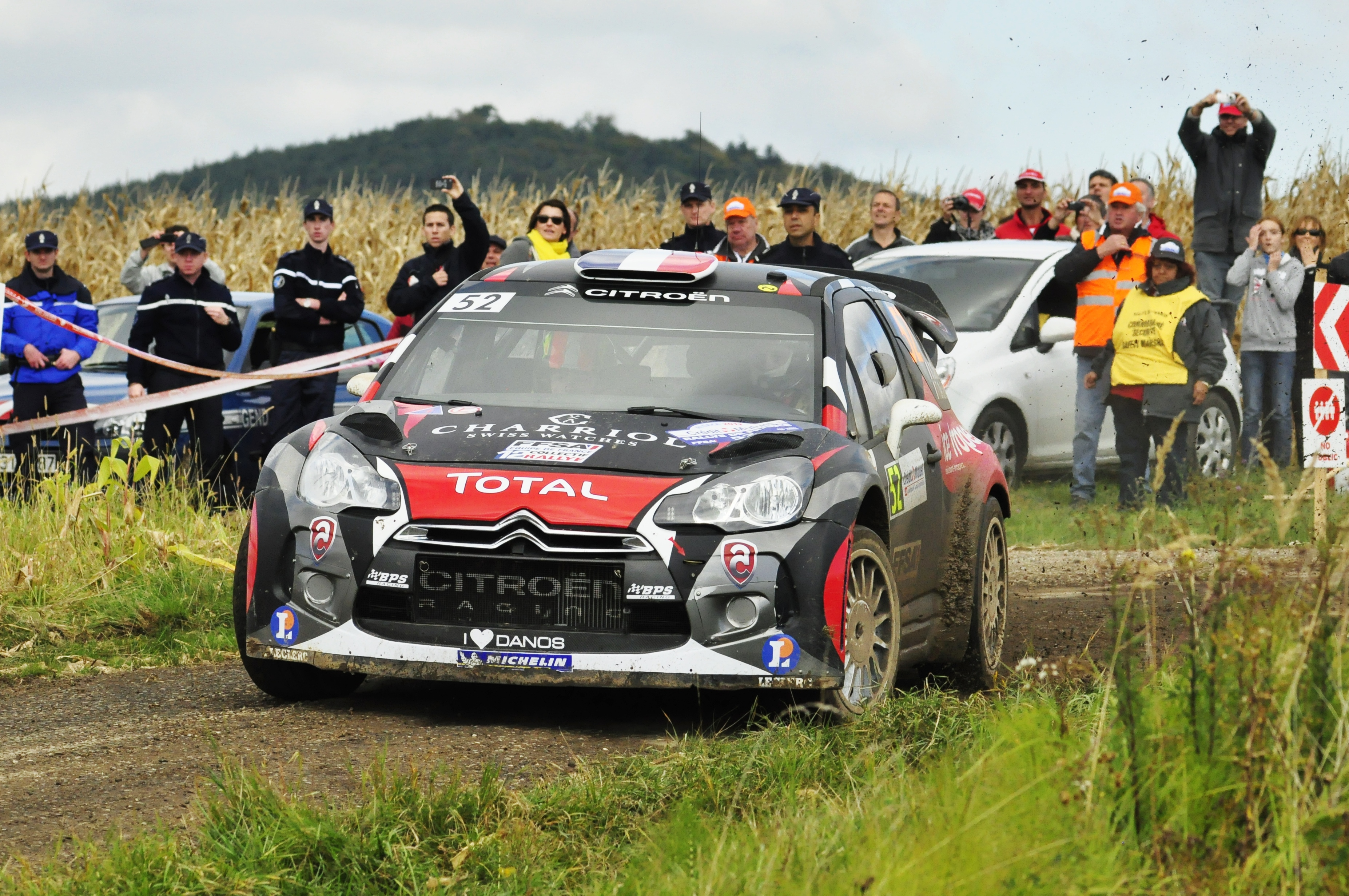 Sébastien Chardonnet podczas Rajdu Francji 2012